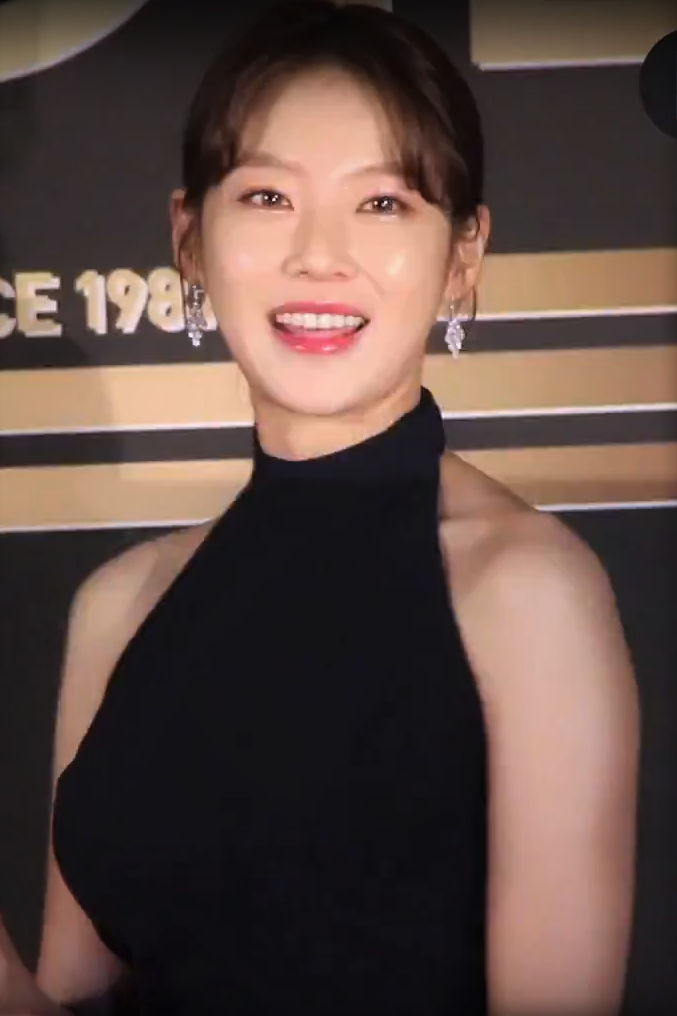 2017 KBS연기대상 레드카펫 공승연